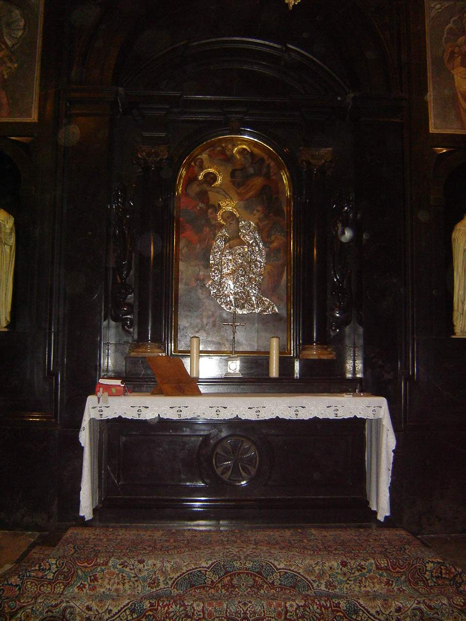 Jasna Góra Kaplica Św. Pawła Pustelnika